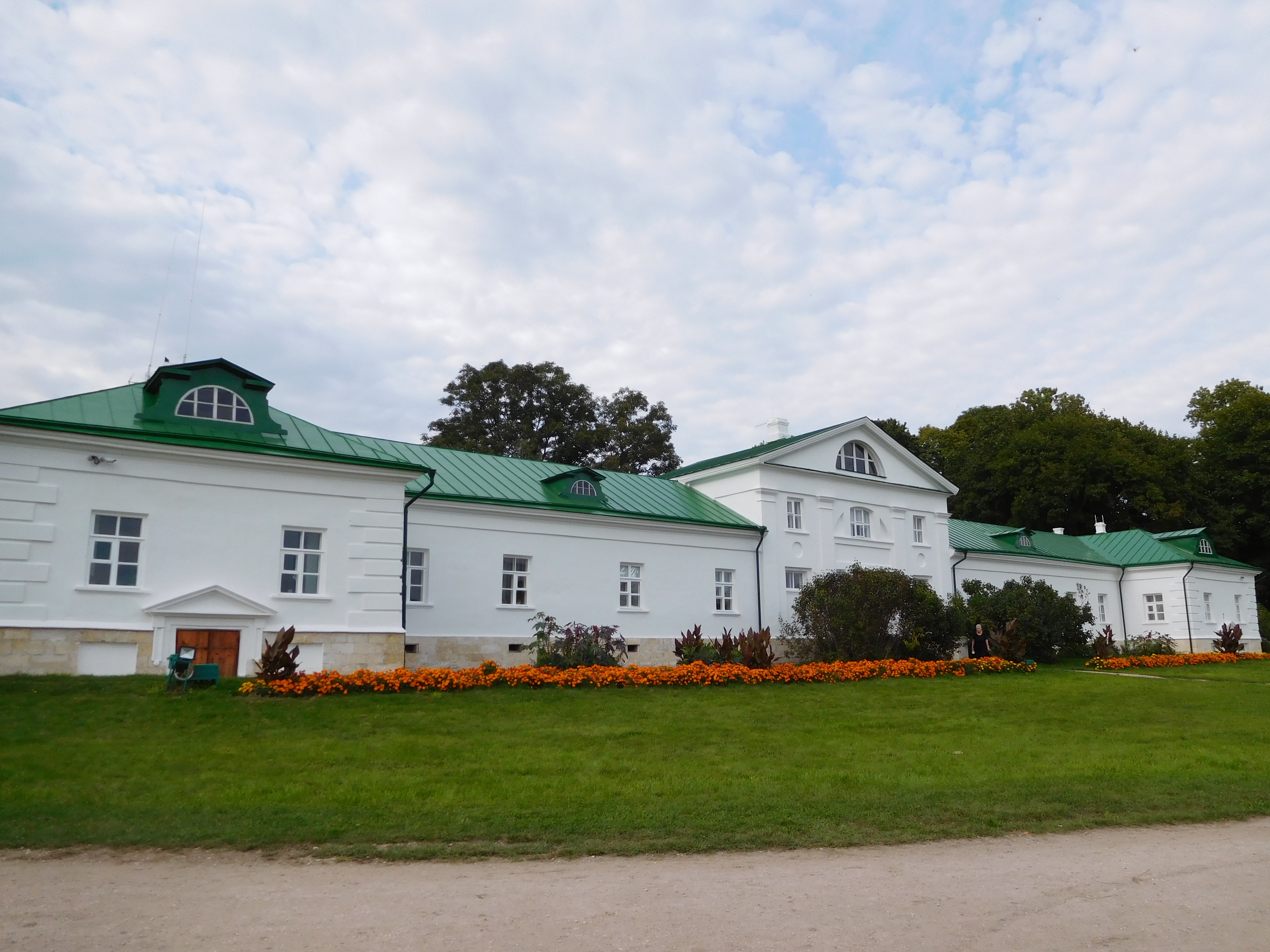 Музей-заповедник Л.Н. Толстого 'Ясная поляна': Музей-заповедник расположен в основном в пойме р. Воронки в 15 км от г, Тулы. В 3,5 км находится ж.-д. станция "Ясная Поляна" Московской ж.д. В 1 км от усадьбы проходит шоссе Москва - Симферополь. На севере, северо-востоке и северо-западе ООПТ граничит с Тульскими засеками (земли Гослесфонда), на юге и юго-востоке — с сельхозугодьями, на востоке — с территорией Яснополянской больницы, Щёкинский район, Тульская область This image is related to the protected area of Russia number 7100085